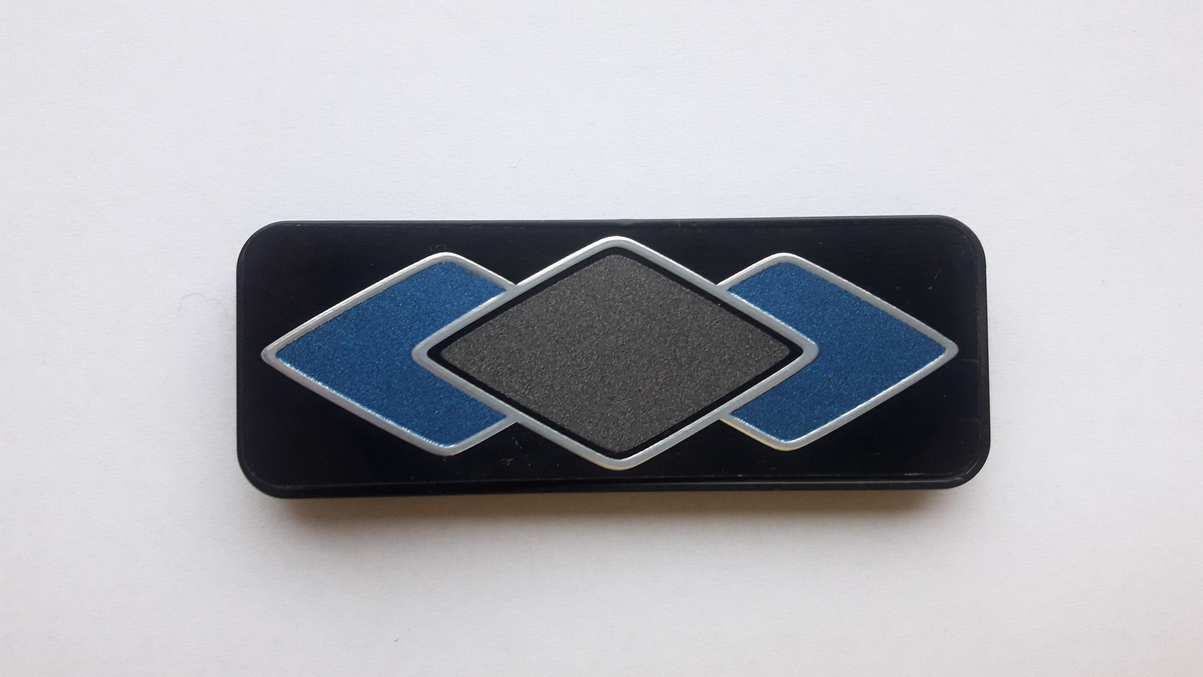 samsung 20180319 171500